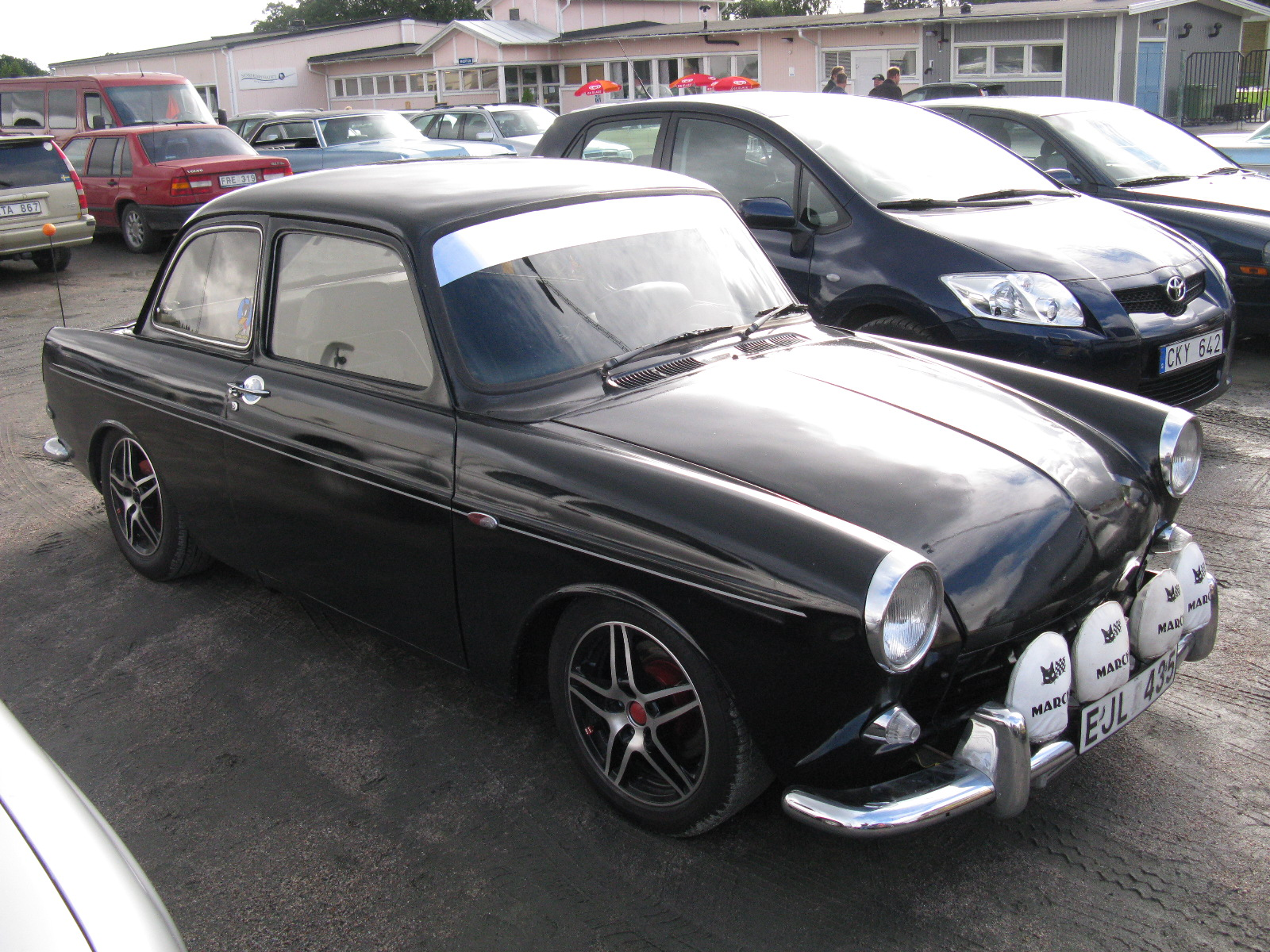 Volkswagen Type 3 Notchback